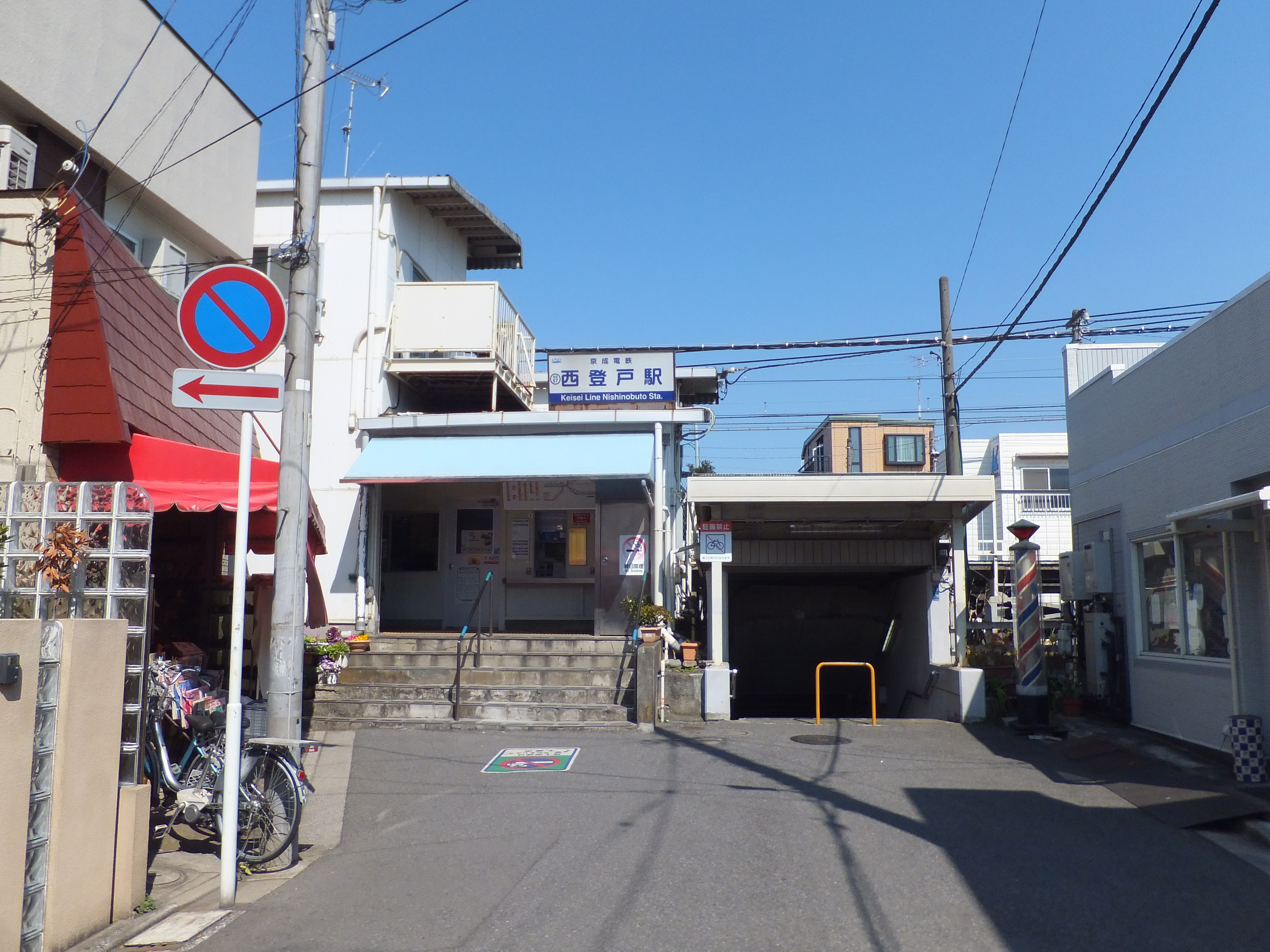 京成千葉線西登戸駅